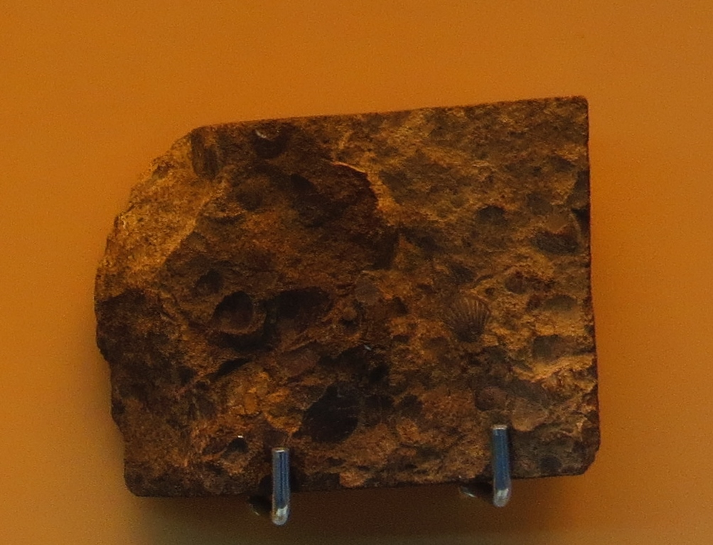 Took the picture at Natural History Museum, Nurnberg